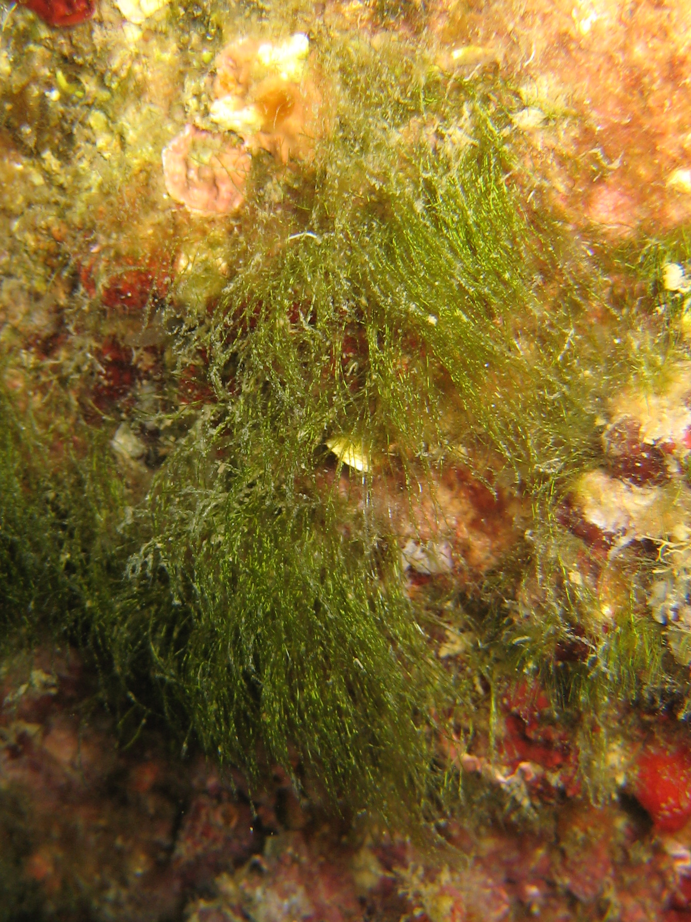 Ulva compressa en Méditerranée près de Banyuls